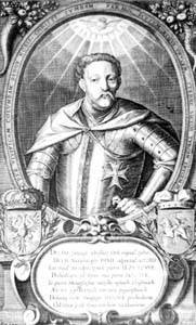 Кароль Ян ІІІ Сабескі. Медыярыт Аляксандра Тарасевіча.